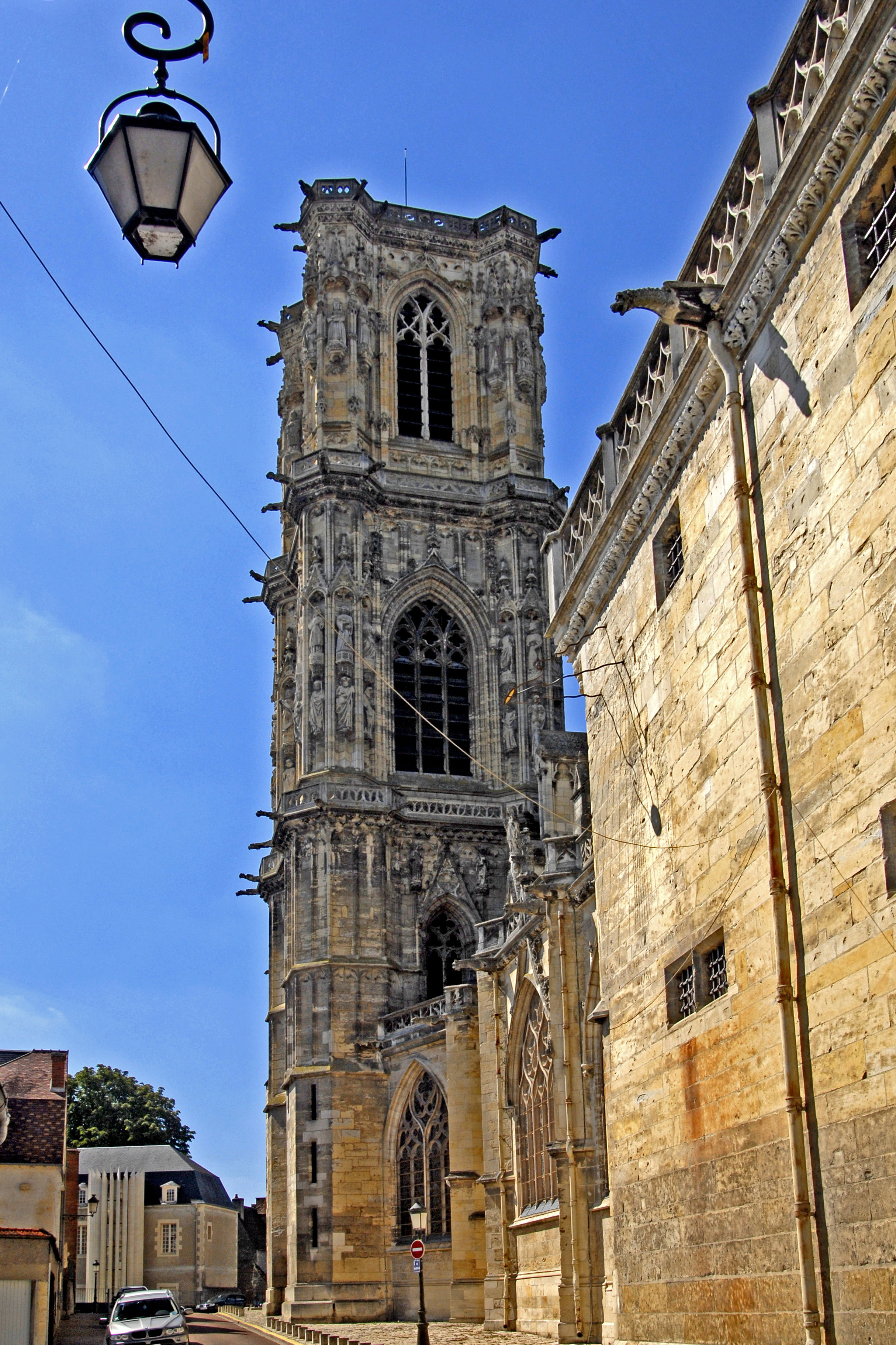 Kathedrale Nevers, Glockenturm von O